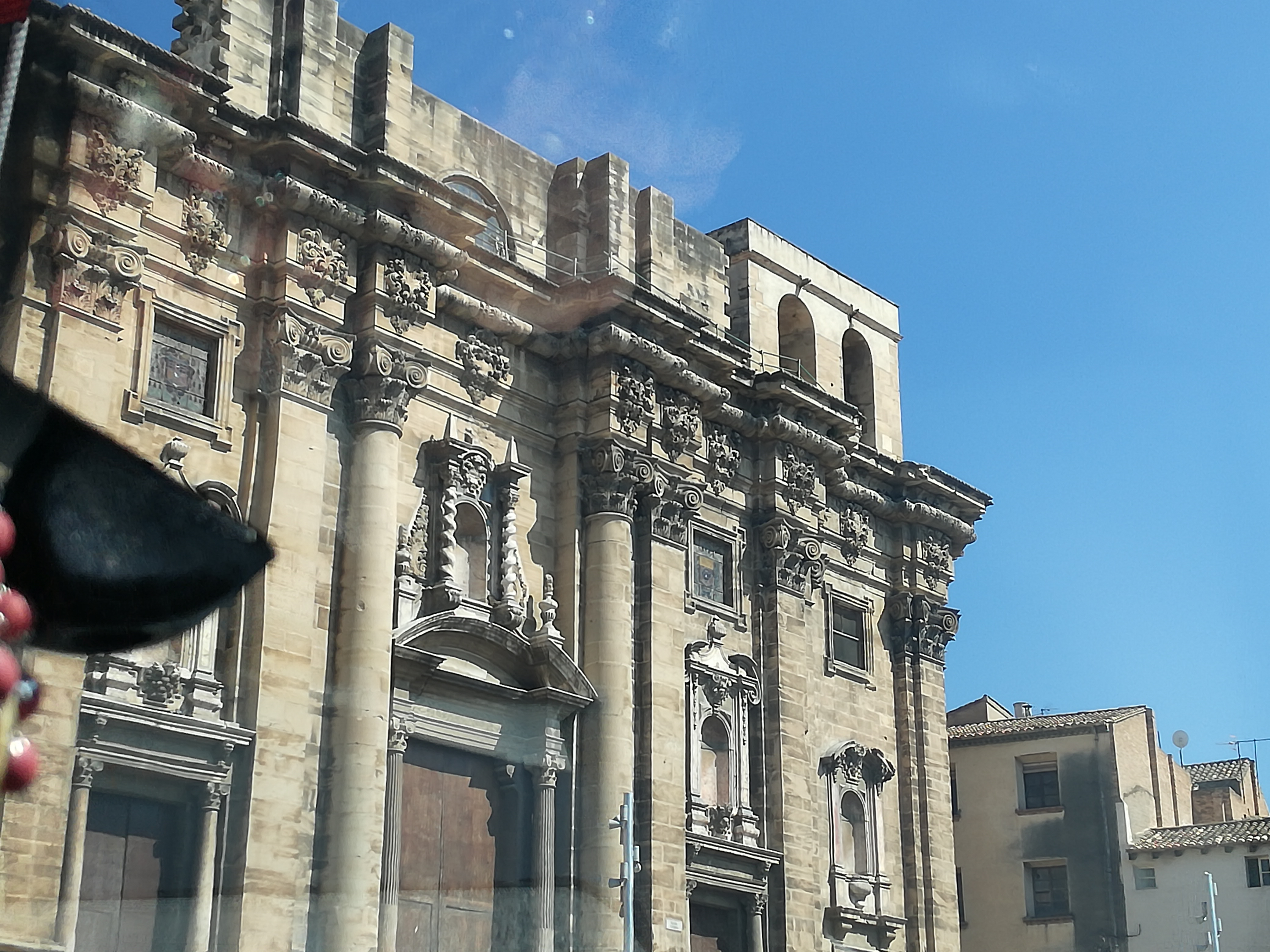 Cattedrale